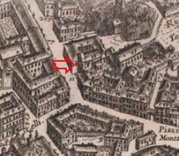 Pianta di Falda